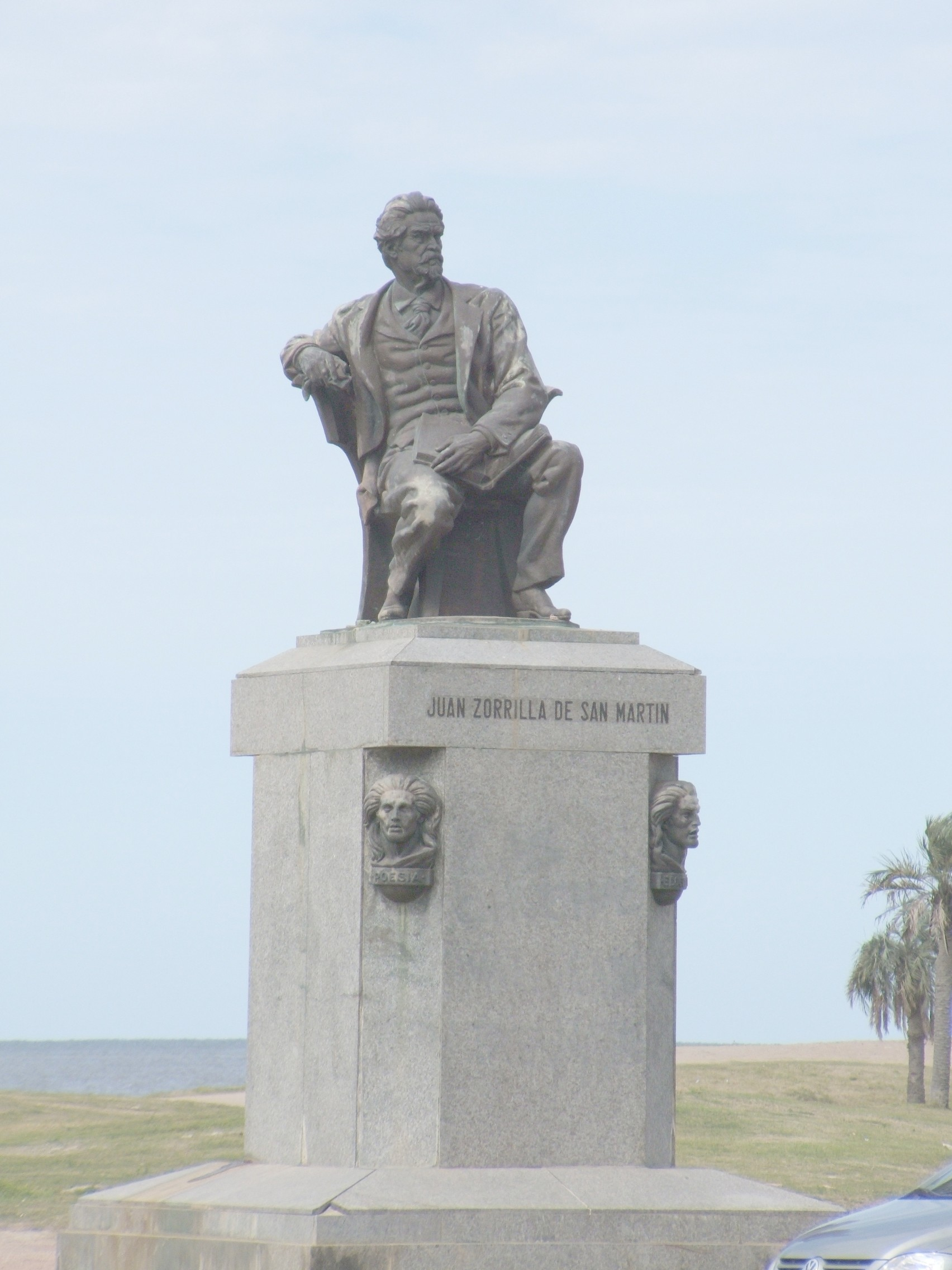 Escultura de Juan Zorrilla de San Martín en Punta Carretas, por su hijo José Luis Zorrilla de San Martín